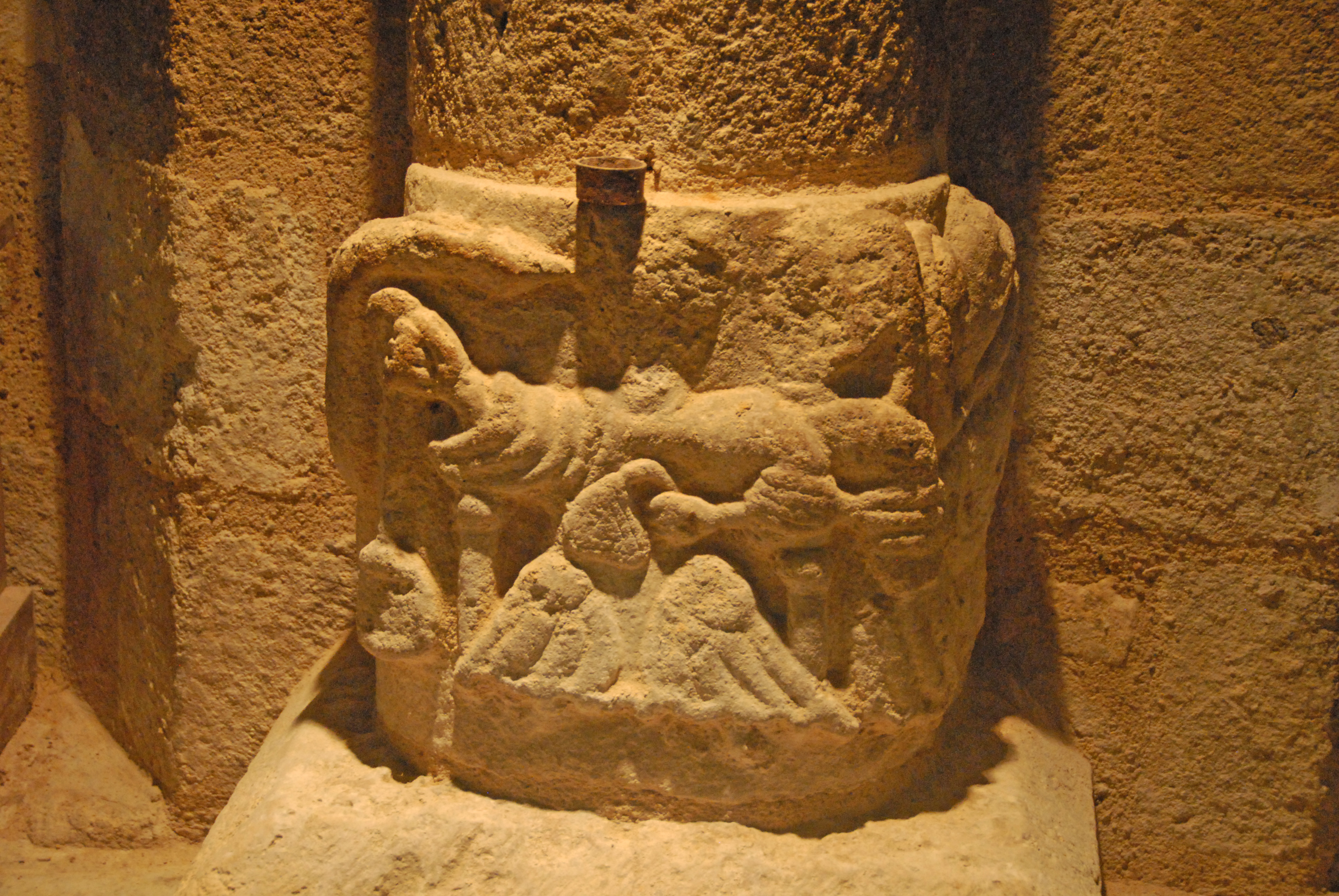 Neuvy_St.-Sépulcre, Rotunde, Dienstbasis, der Geiz